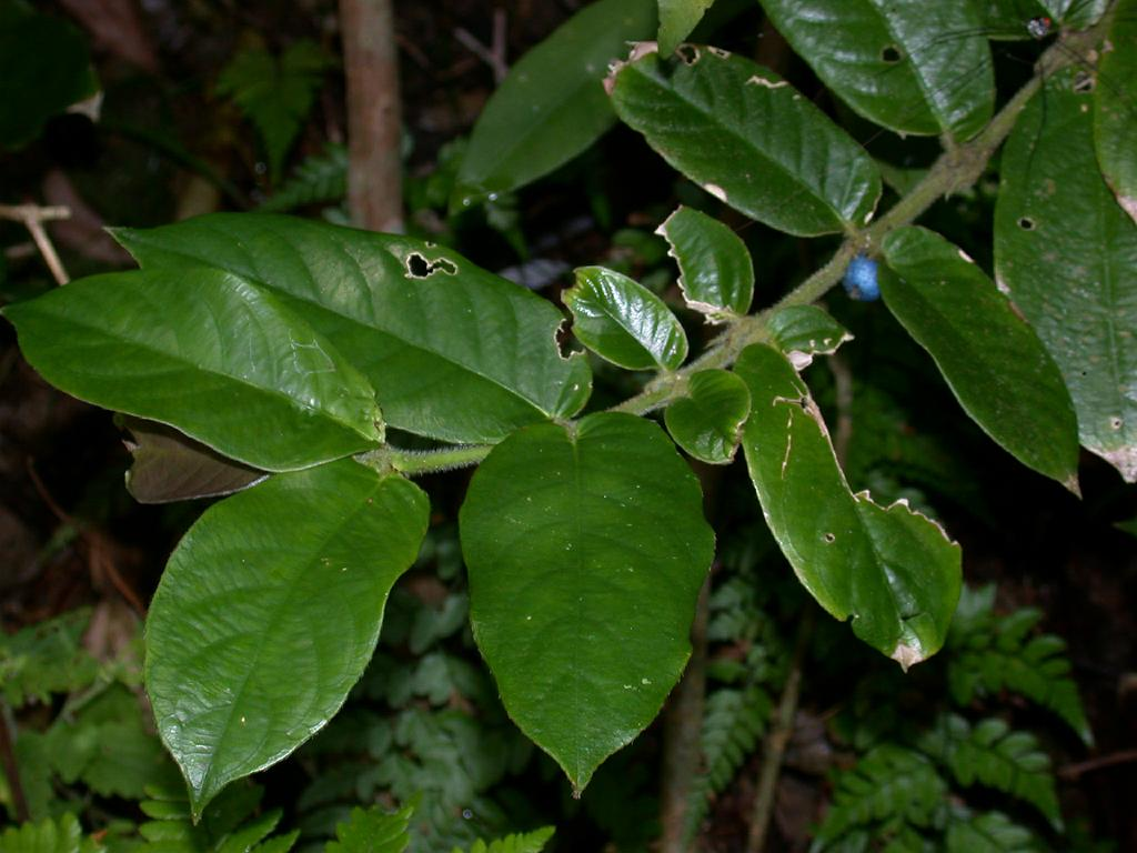 Lasianthus attenuatus：マルバルリミノキ 2006/08/10 沖縄本島：Okinawa Island, Japan